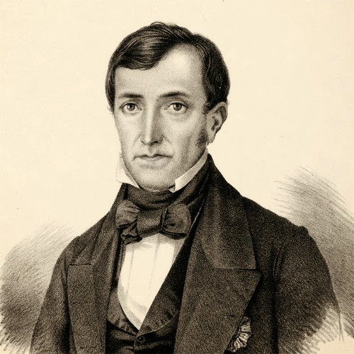 O empresário, armador, industrial e banqueiro Barão de Mauá ficou em 45º colocado.